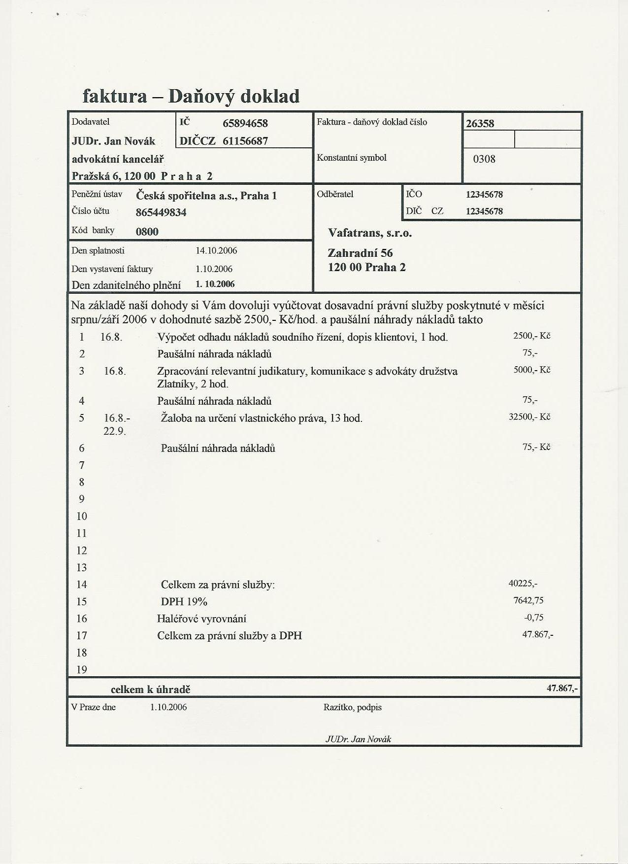 Faktura - Daňový doklad